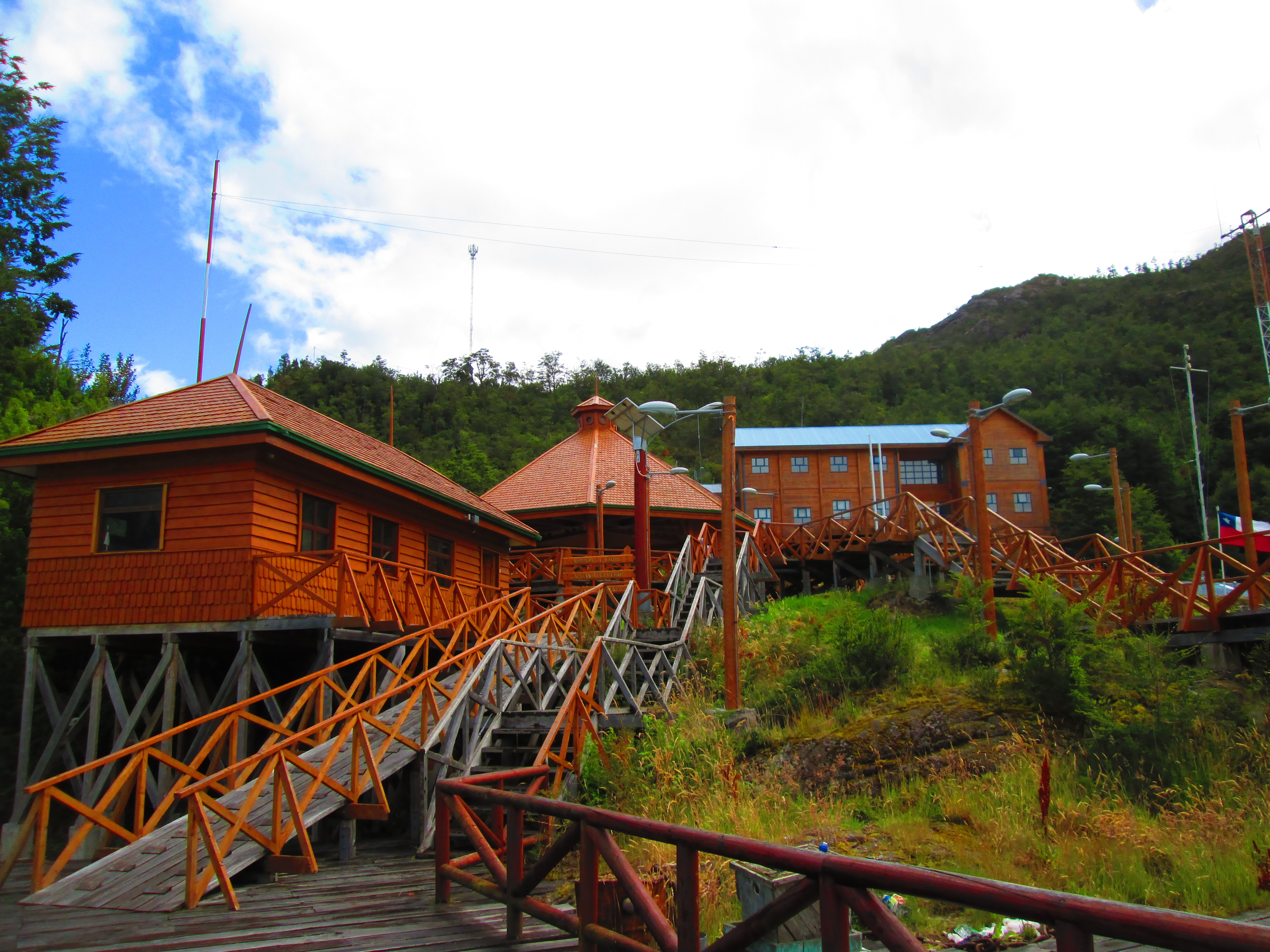 Sector Base, donde se encuentra la municipalidad de Caleta Tortel, región de Aysén.